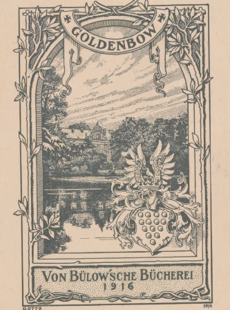 Exlibris Von Bülow'sche Bücherei Goldenbow 1916, in: De Biblie mit vlitigher Achtinghe recht na deme latine in dudesck auerghesettet, mit Vorluchtinghe vnde Glose des hochgelerden Postillatoers Nicolai de Lyra vnde anderer velen hillighen Doctoren. (Lübecker Bibel 1494), Library of Congress